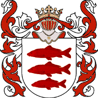 Přibližný erb rodu Bechyňů z Lažan, bez rohů a praporů (podle [1] a knihy České erby Janáčka a Loudy)